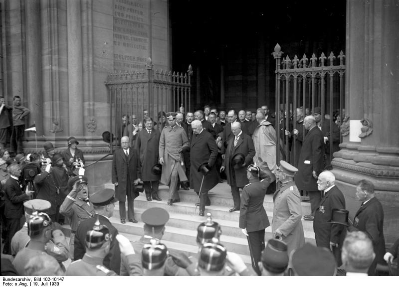 Der jubeldene Empfang des Reichspräsidenten von Hindenburg im befreiten Rheinland! Reichspräsident von Hindenburg beim Verlassen des Speyerer Doms nah der Besichtigung. Neben dem Reichspräsidenten sein Sohn und der bayerische Ministerpräsident Dr. Held. Dahinter Reichsaussenminister Dr. Curtius.